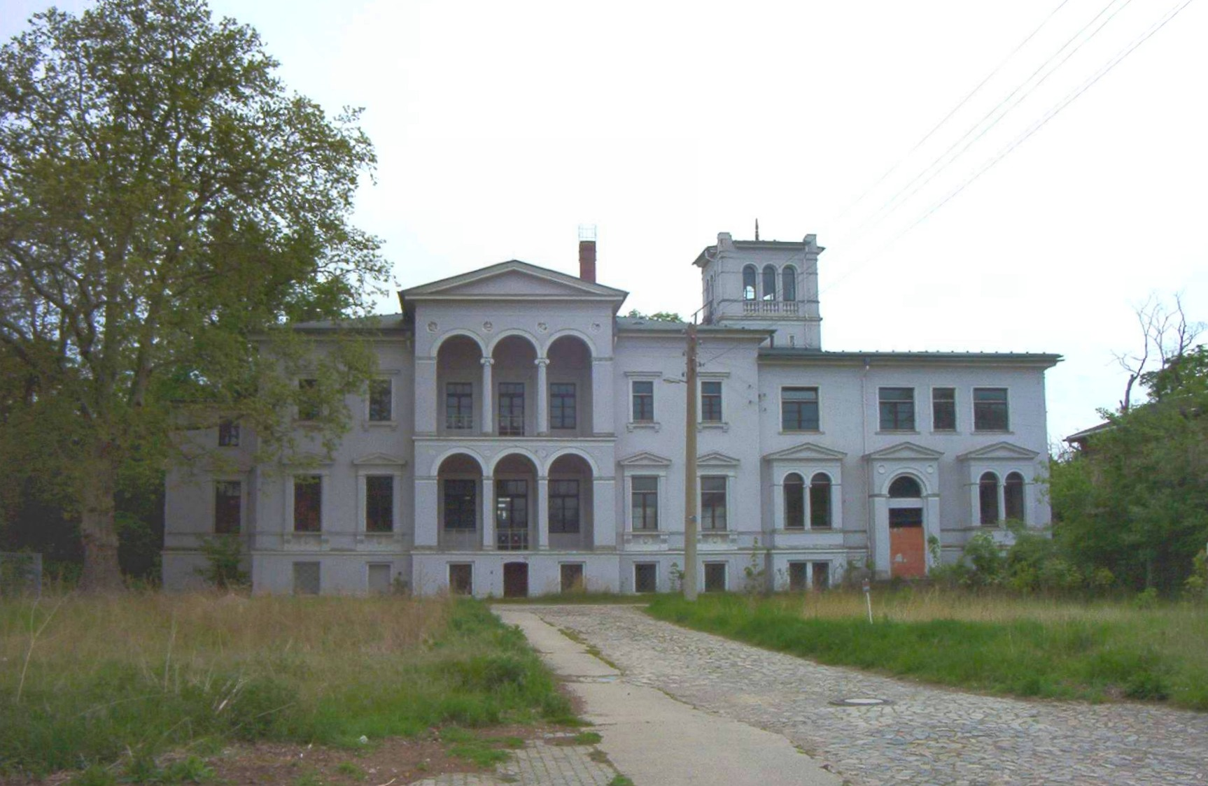 Schloss Randau, Vorderfront